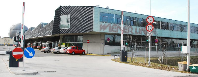 Betriebsgarage Leopoldau der Wiener Linien in Floridsdorf, im Hintergrund ein Kugelgasbehälter auf dem Areal des ehemaligen Gaswerks Leopoldau